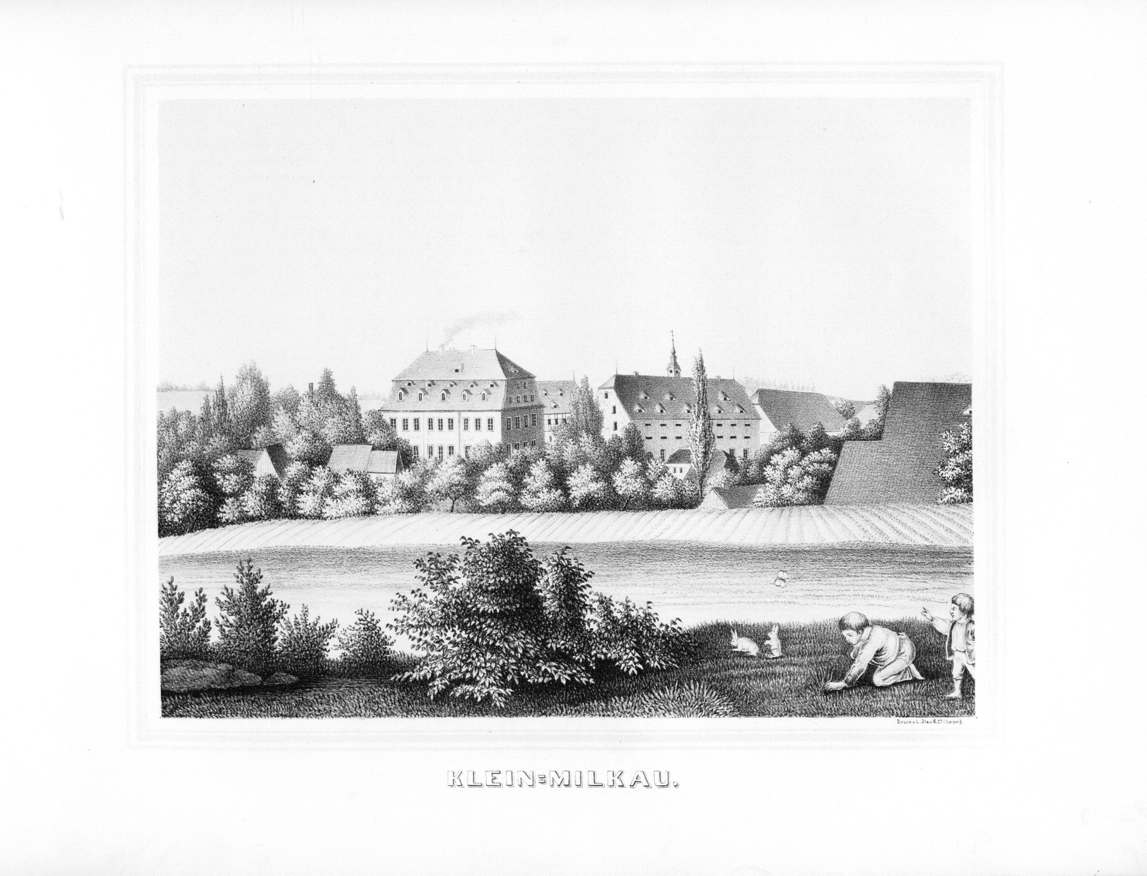 Kleinmilkau aus: Album der Rittergüter und Schlösser im Königreiche Sachsen Leipziger Kreis Section: I